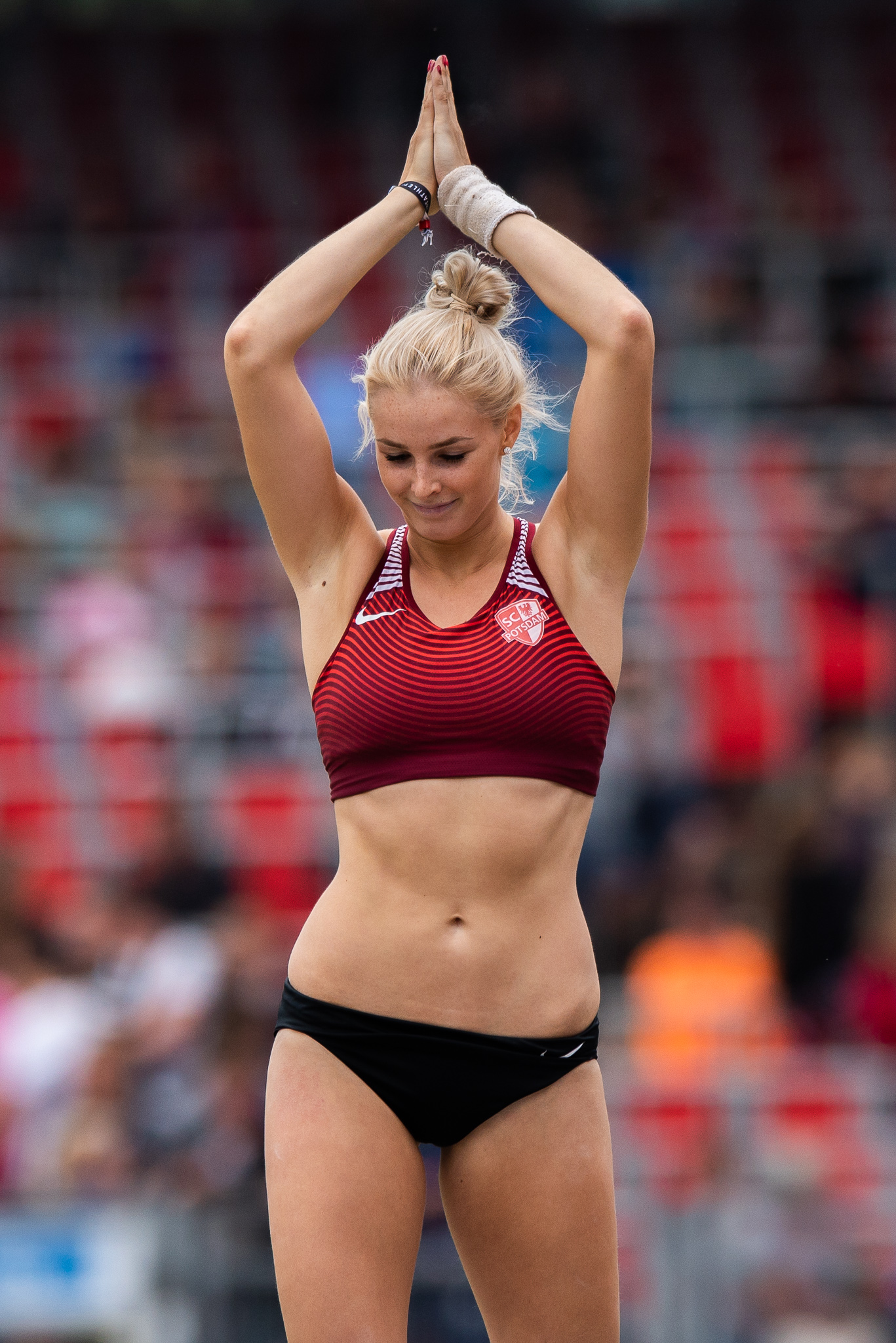 DLV,Deutsche Leichtathletik Meisterschaften 2018,Deutscher Leichtathletik-Verband,Friedelinde Petershofen,Max-Morlock-Stadion,Pole vault,SC Potsdam,Stabhochsprung